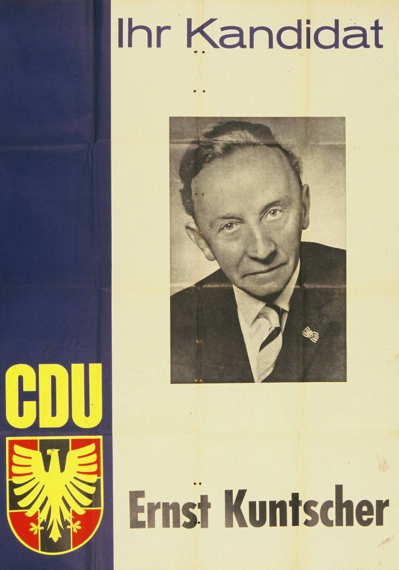 Ihr Kandidat Abbildung: Porträtfoto Plakatart: Kandidaten-/Personenplakat mit Porträt Objekt-Signatur: 10-001: 1035 Bestand: Plakate zu Bundestagswahlen (10-001) GliederungBestand10-18: Plakate zu Bundestagswahlen (10-001) » Die 4. Bundestagswahl am 17. September 1961 » CDU » Mit Porträtfoto Lizenz: KAS/ACDP 10-001: 1035 CC-BY-SA 3.0 DE